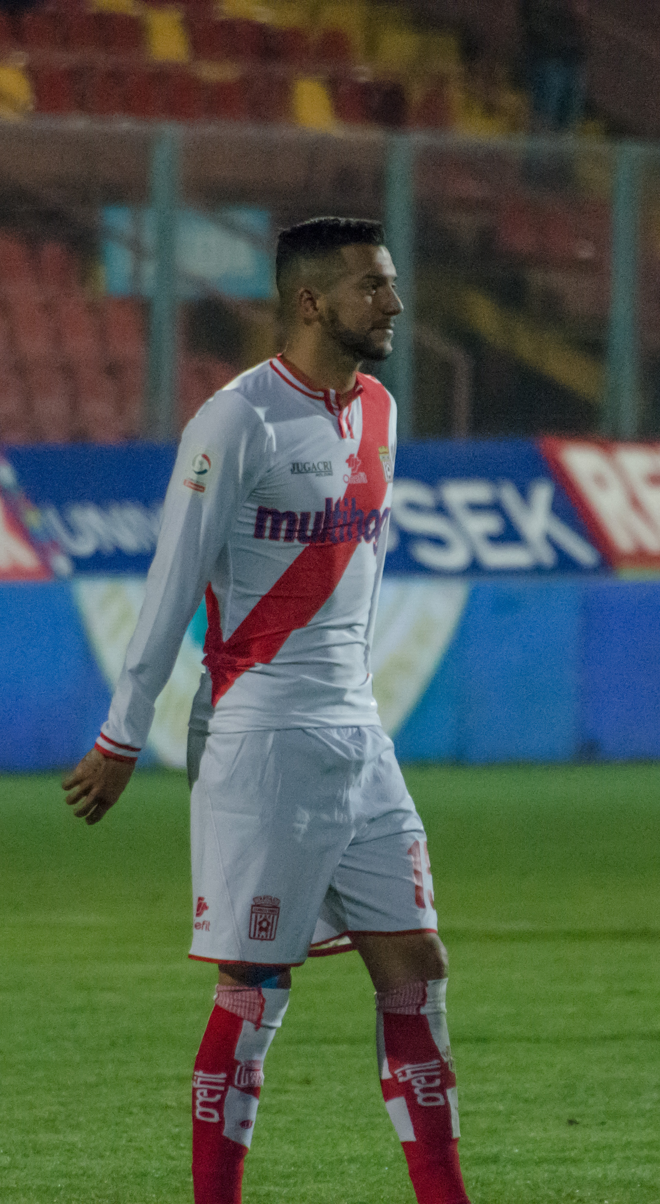 Neri Bandiera, Unión Española v Curicó Unido, Estadio Santa Laura, Independencia, Santiago, Chile